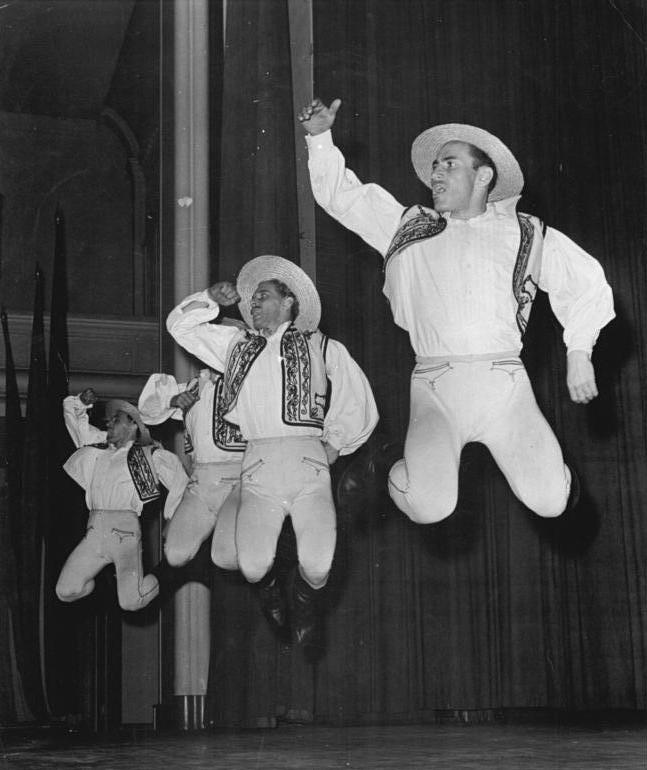 Halle/Saale, 1. Arbeiterfestspiele, ungarische Tanzgruppe Zentralbild Schmidt 17.6.1959 1. Arbeiterfestspiele in der DDR. Mit einem Wirbel ungarischen Temperaments, ausgeprägtester Musikalität, satt leuchtender Kostüme mit weit schwingenden Röcken und mitreißender Rhythmen, verdiente sich am 16.6.1959 das Staatliche Tanz-, Musik- und Gesangsensemble "Duna" der ungarischen Volksrepublik im halleschen Volkspark herzlichsten Beifall des Festspielpublikums. UBz: Echt ungarisches Temperament und tollkühne Sprünge waren in dem Tanz der "Männer" zu sehen.